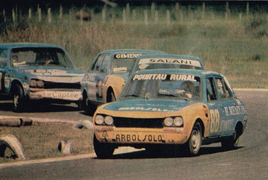 El Peugeot 504 TN, el auto mas importante en la trayectoria de "Pancho" Alcuaz, con el que ganó las mejores carreras y su primer campeonato. "El 88".